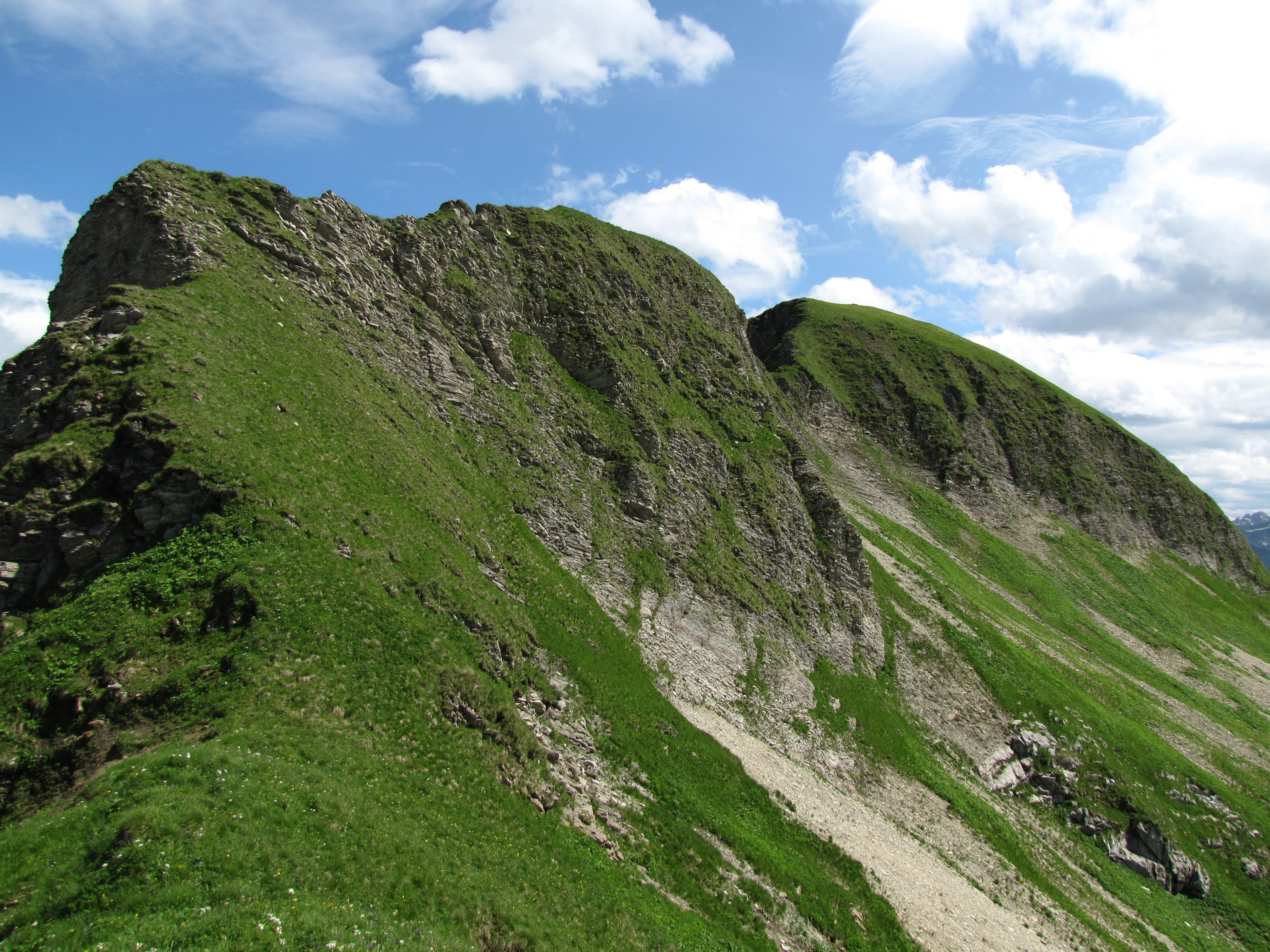 Blick auf die Westflanke des Kleiner Seekopf (2096 m)